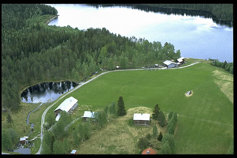 Torvsjö kvarnar Motiv: Torvsjö Nyckelord: Flygbilder, Riksintressen Kategori: KvarnTorvsjö kvarnar.